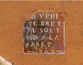 Rajola de mitgeria del carrer de les Ànimes, 12 (Palafrugell)